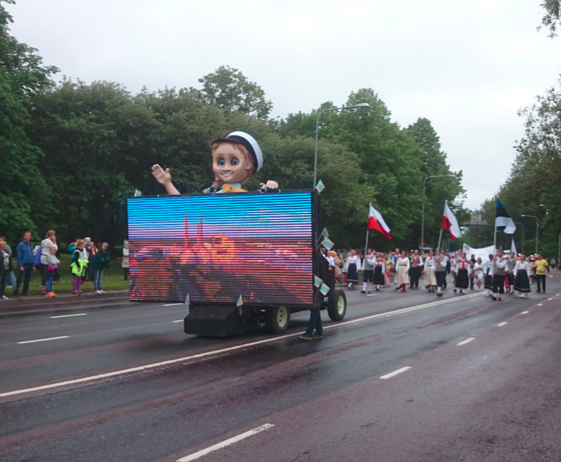 Tartu Vaim Laulupeol